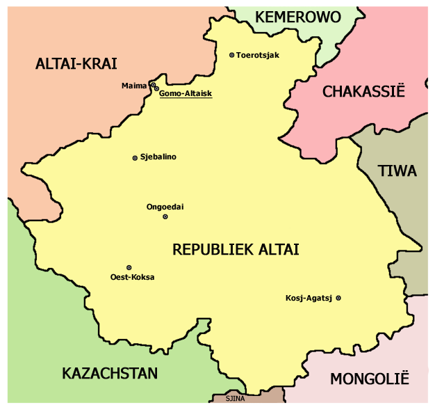 Kaart van die Republiek Altai in Rusland